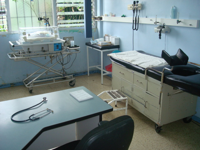 Consultorio médico de un EBAIS. Costa Rica.